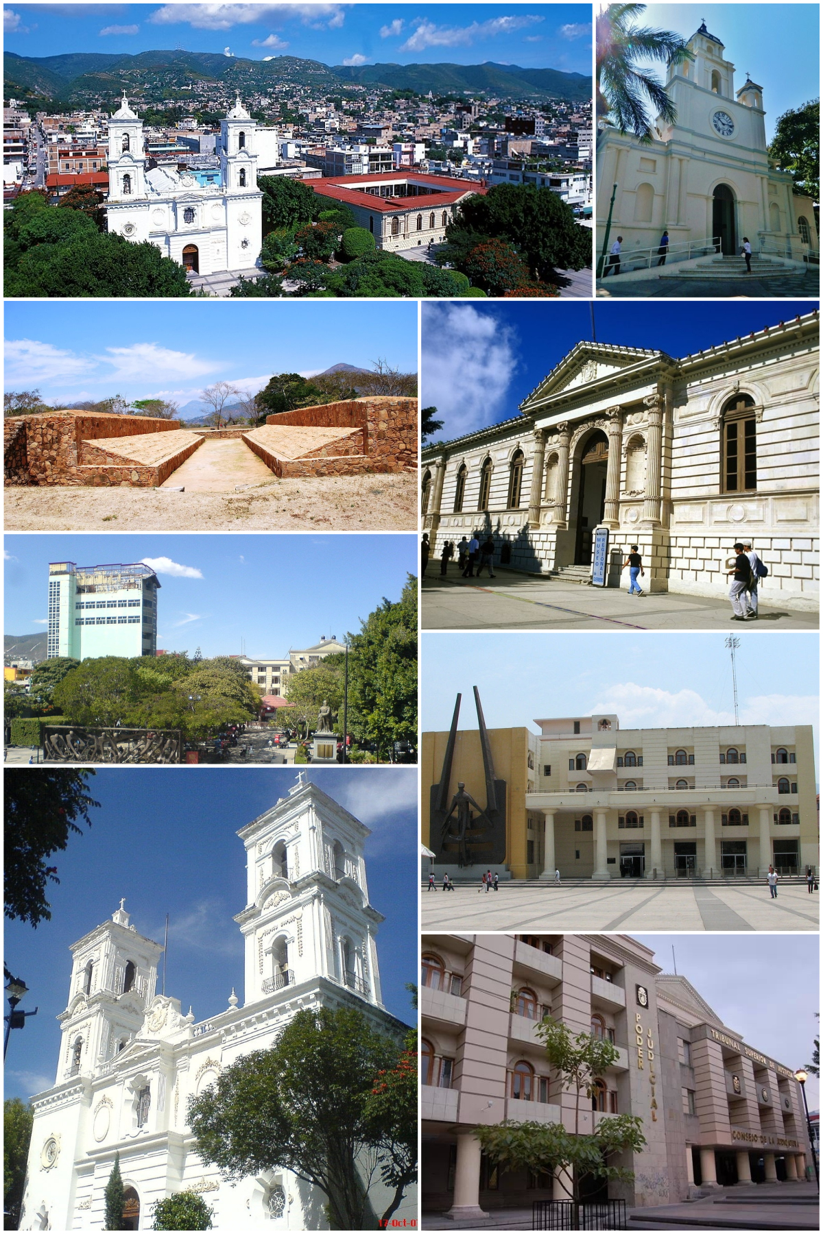 Chilpancingo de los Bravo